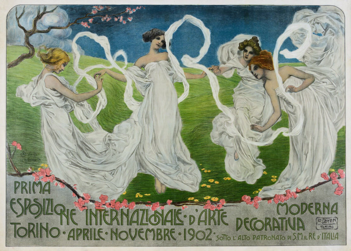 Locandina di Leonardo Bistolfi (1895-1933).